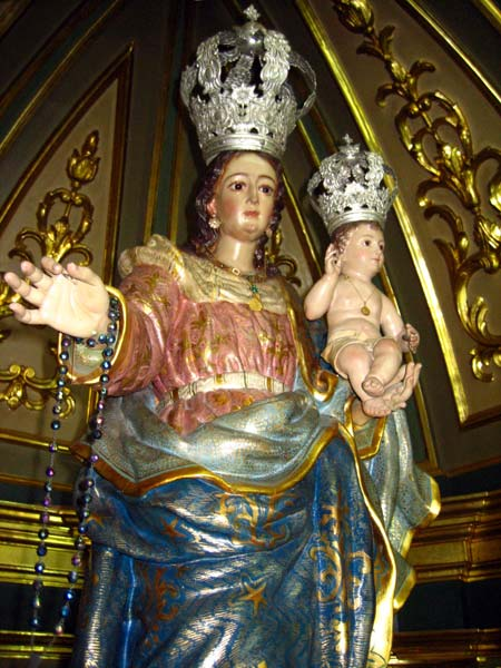 Virgen Del Rosario de Santomera